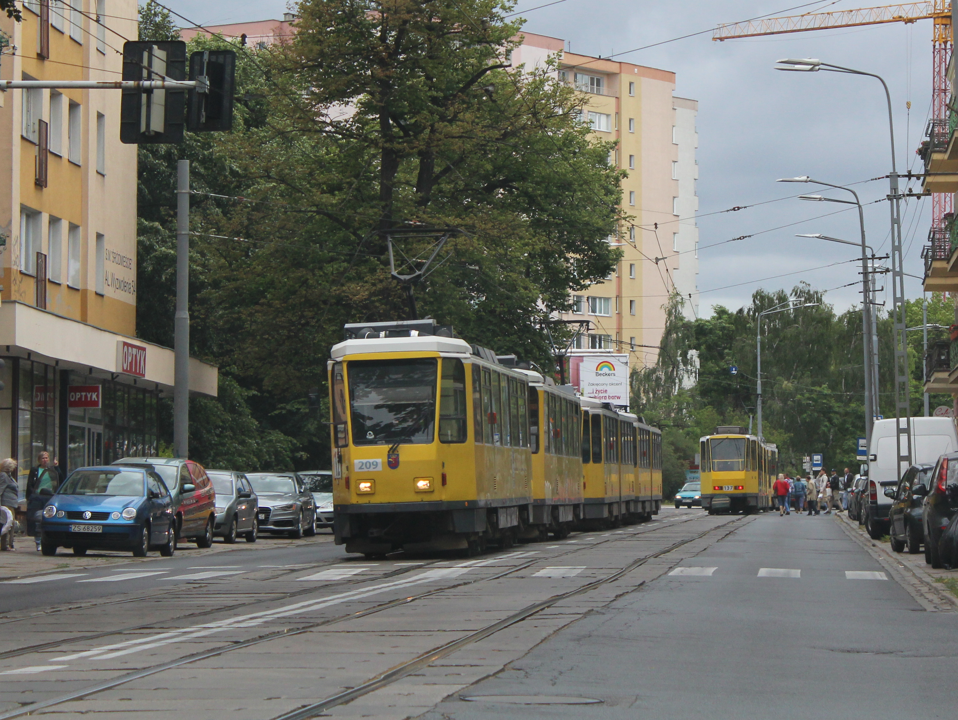 Cropped version of image File:Trams_in_Szczecin,_2015.jpg.